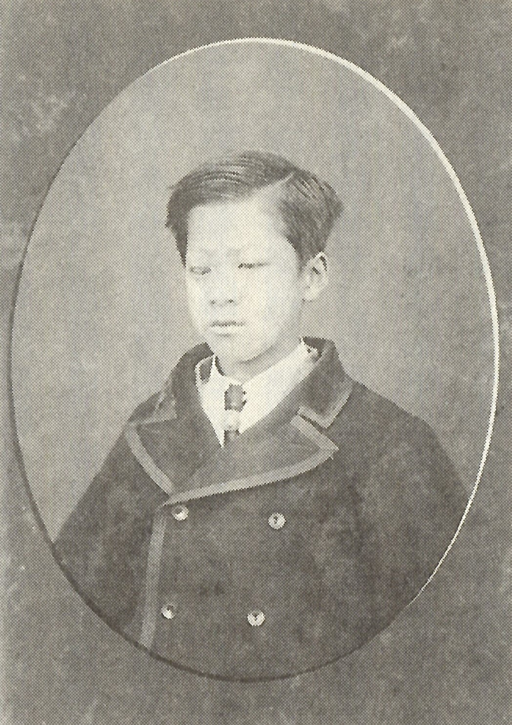 舟橋遂賢の肖像写真。